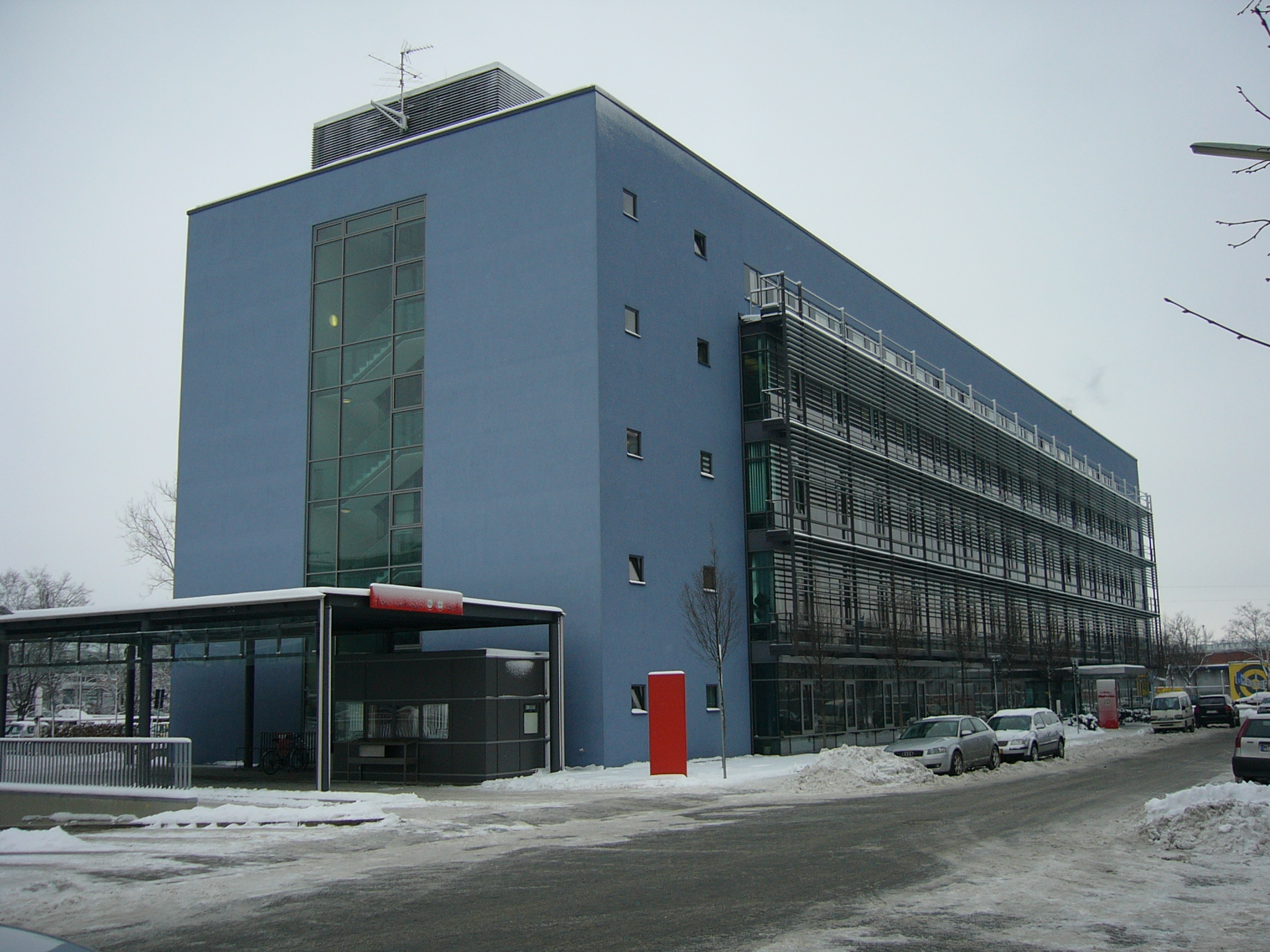 Dienstgebäude der Landeshauptstadt München — Kreisverwaltungsreferat III/2 (Kraftfahrzeugzulassungs- und Fahrerlaubnisbehörde), Eichstätter Str. 2 (Blickrichtung Westendstr.)